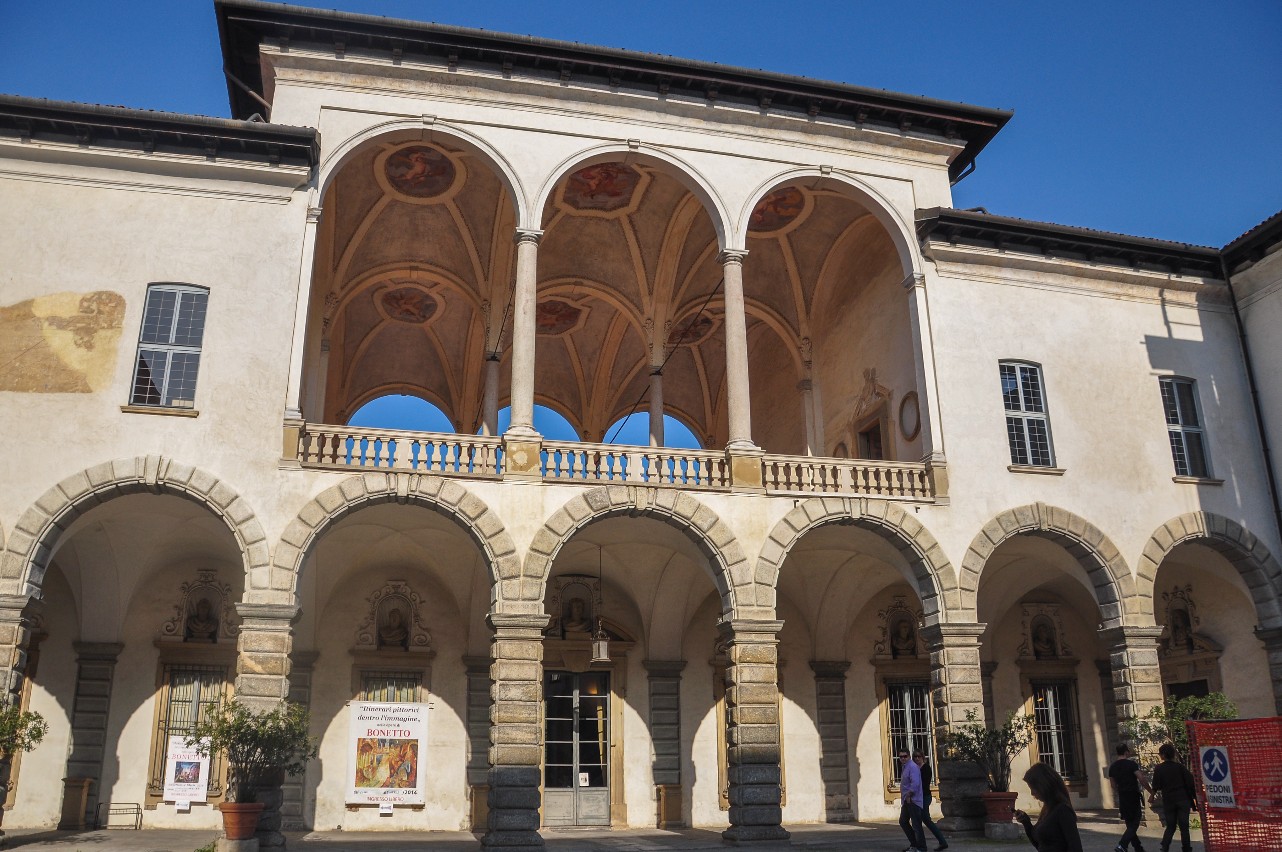 Palazzo borromeo Arese dal cortile interno dettaglio del patio